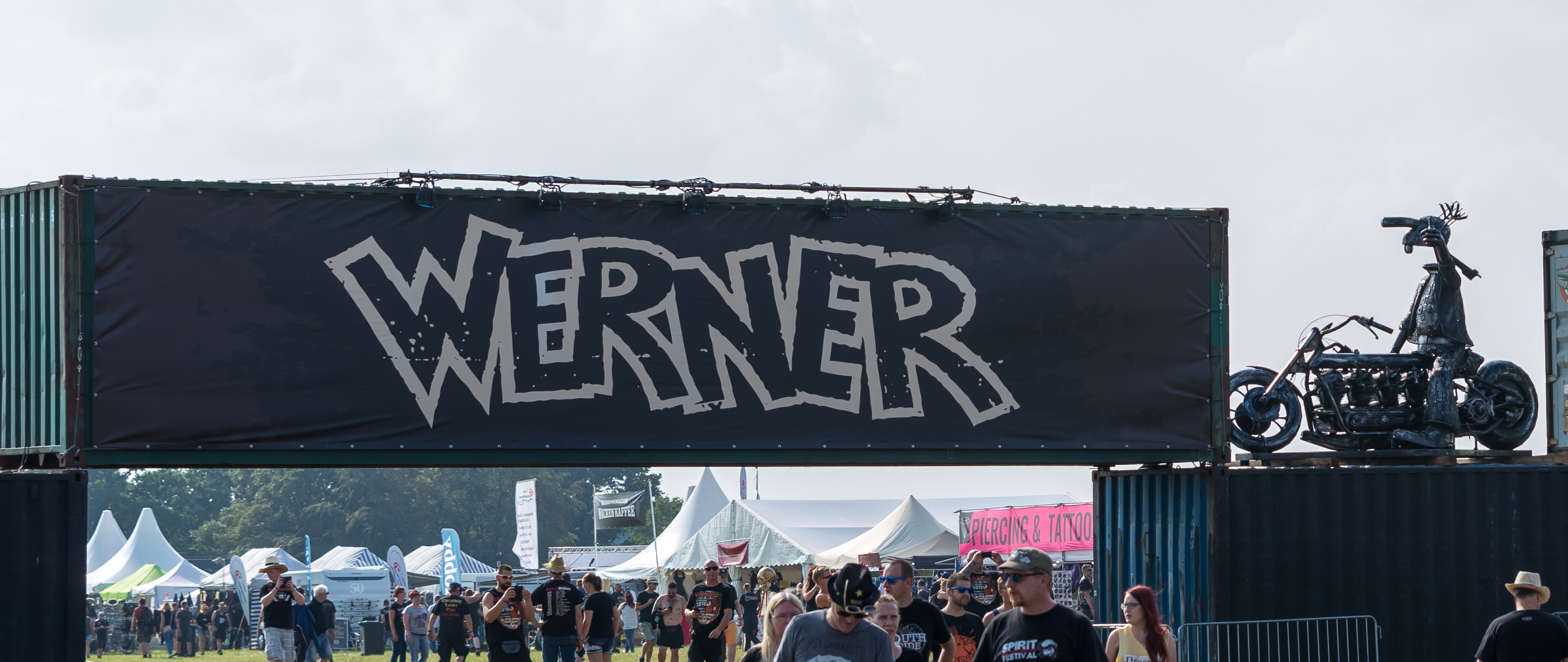 Festivalgelände during Werner Rennen at Flugplatz Hartenholm, Hasenmoor, Schleswig-Holstein, Germany on 2019-08-29, Photo: Sven Mandel